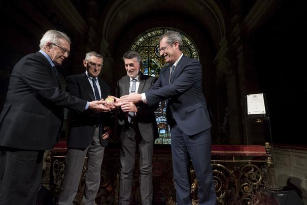 Gipuzkoako Domina entregatzen 2018an ipuzkoako Diputatu nagusiak lurraldeko ikur nagusia entregatzen Joan Jakini Mari Torrealdai, Joseba Intxausti eta Paulo Agirrebaltzategiri. Falta da Joxe Azurmendi.